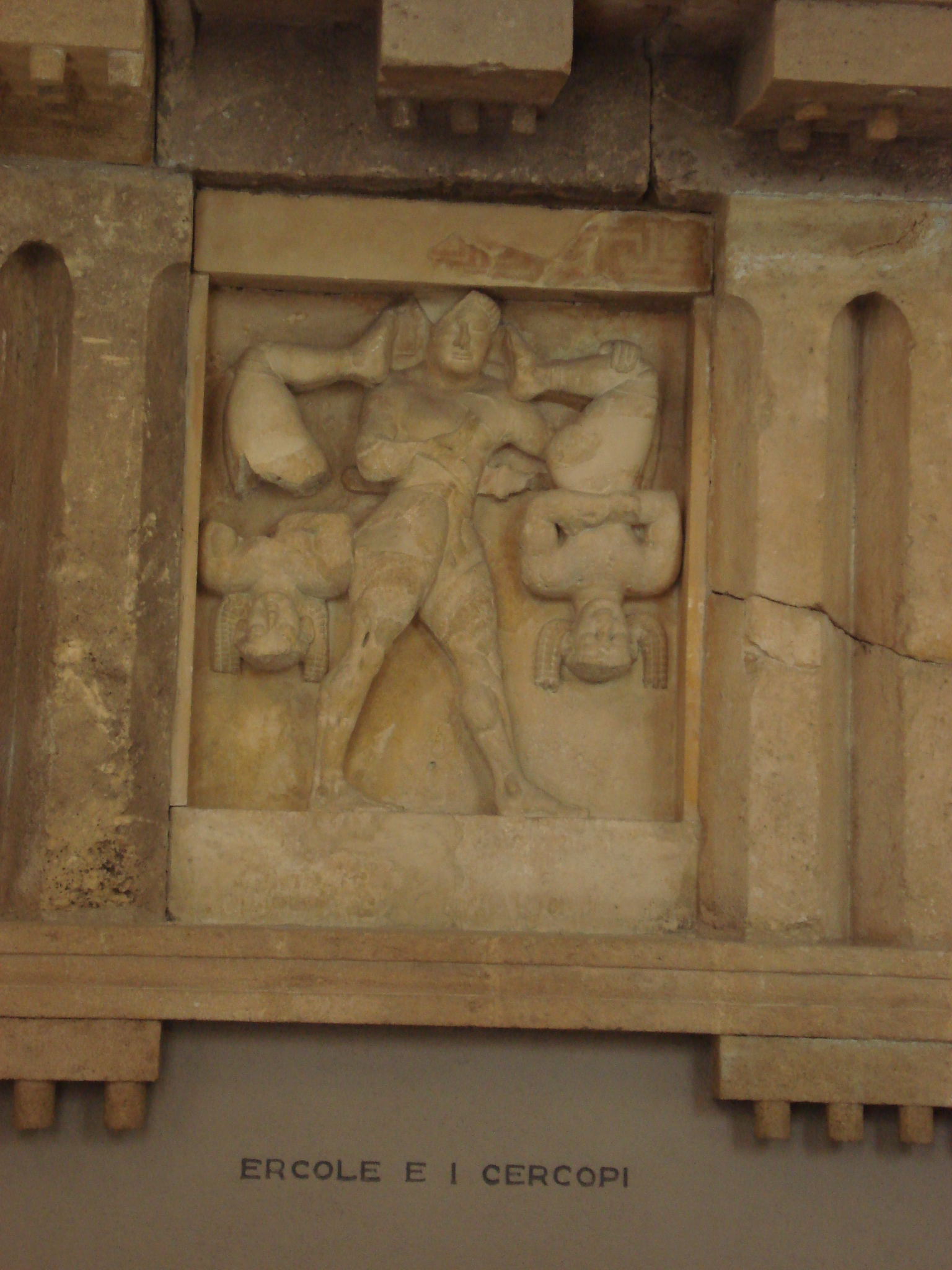 Dal Tempio C di Selinunte: Ercole con i briganti cercopi catturati. Sec. VI a.C. Museo archeologico regionale di Palermo, 28 settembre 2006. Foto di Giovanni Dall'Orto.